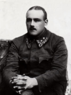 Stefan Miler po powrocie do Zamościa w 1916 roku